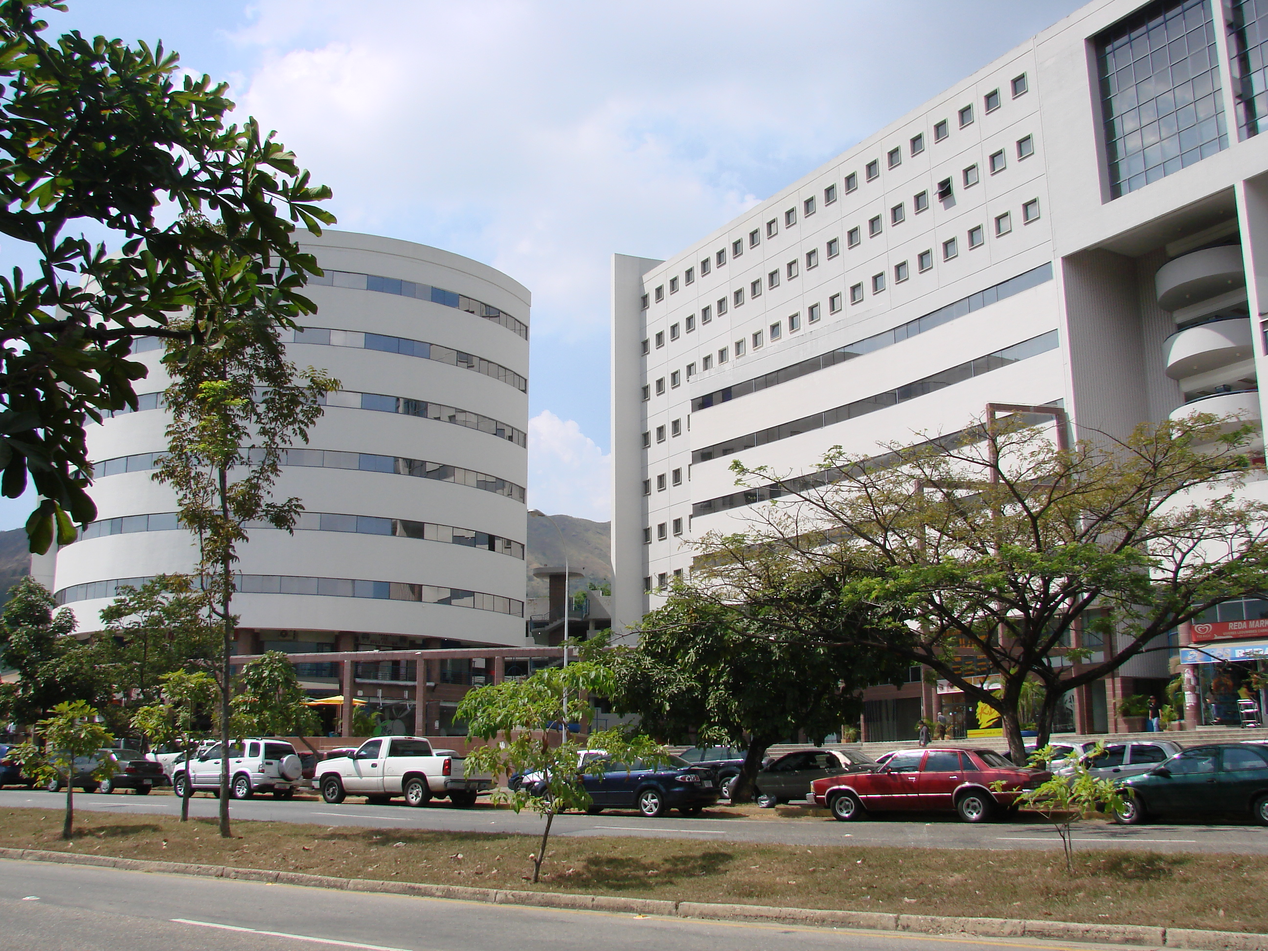 Edificios en Valencia, Venezuela